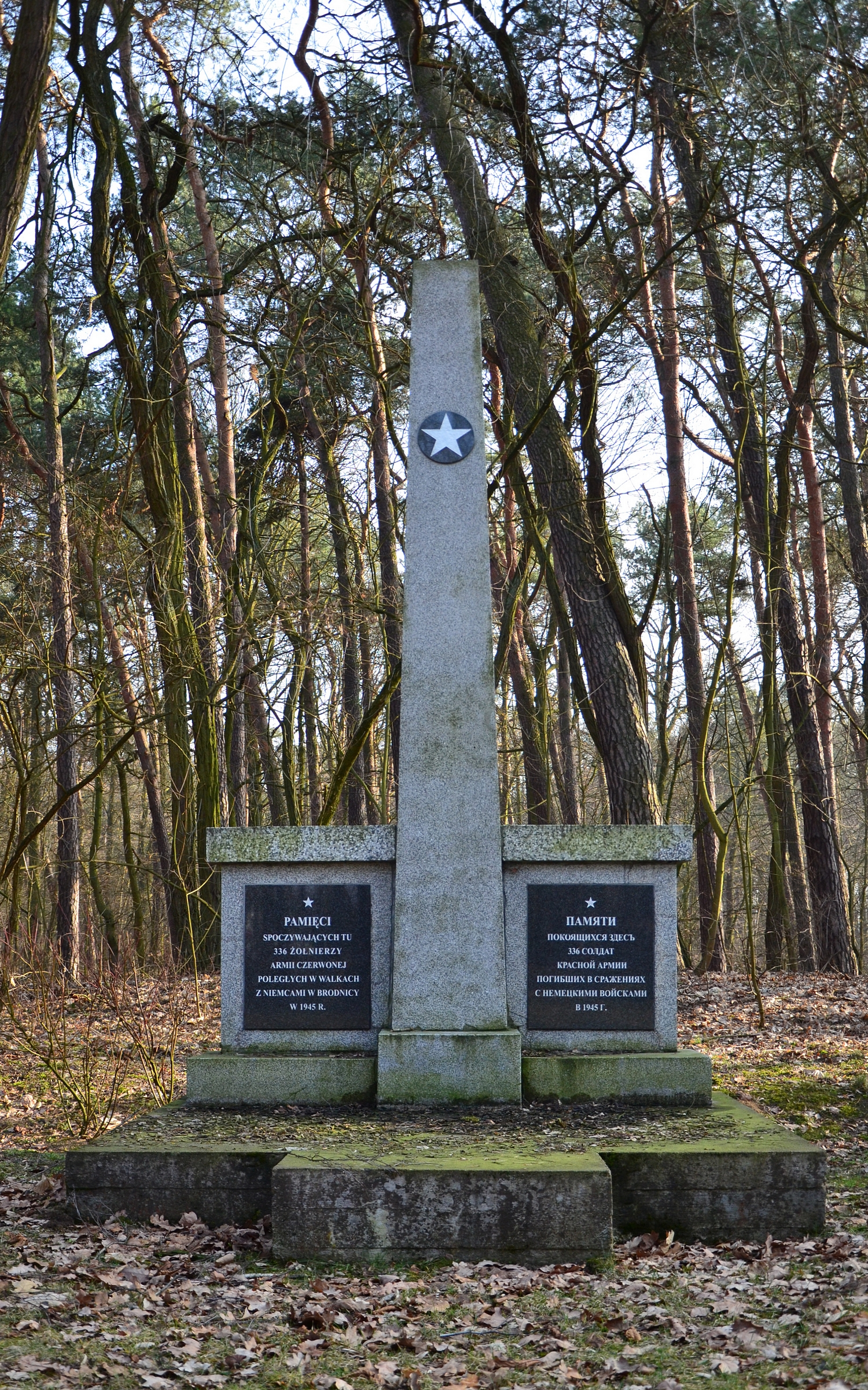 Cmentarz wojskowy w Brodnicy